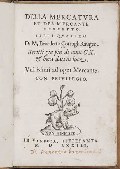 Benedetto Cotrugli: "Della Mercatura", edizione del 1573. Fonte: Università di Yale. Copyright: l'Università informa che: Copyright Statement - Users of this site may copy content from it without permission (excluding any material for which the Yale University Library does not hold copyright) if the Yale University Library is acknowledged in the copy and the copy is used for educational or not-for-profit purposes (